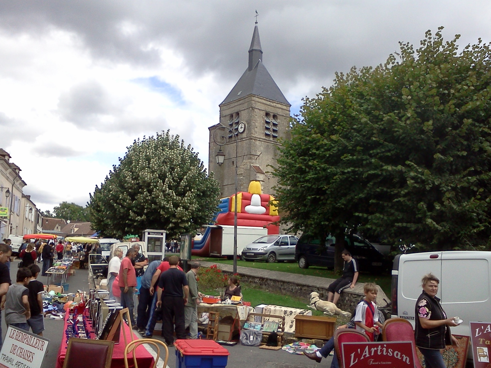 Eglise de Chenoise